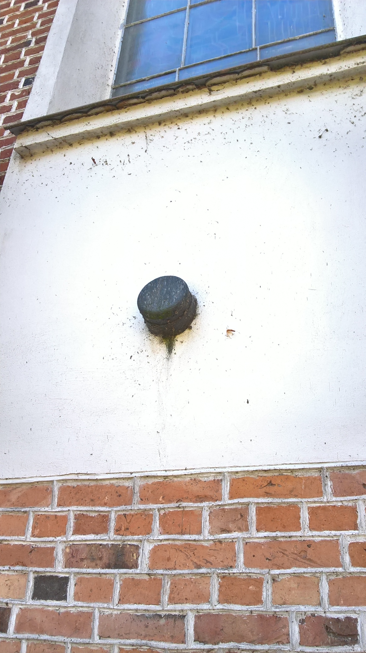 Pocisk z okresu I wojny światowej w północnej ścianie kościoła parafialnego p.w. Zwiastowania NMP w Serocku